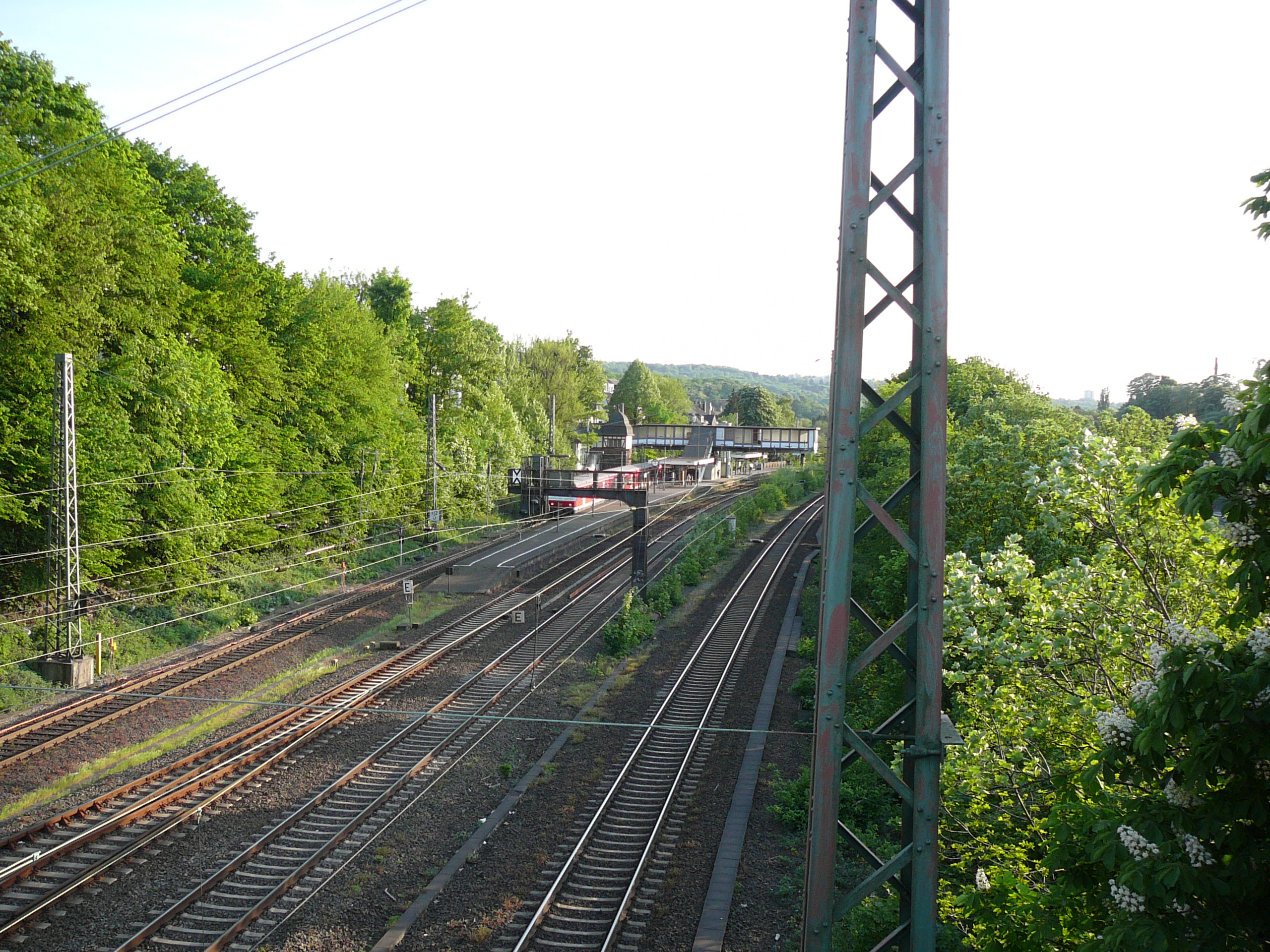 Wuppertaler Bahnhof Zoo, Wuppertal